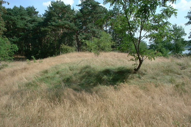 Poland, Wolin - Wisielców Hill